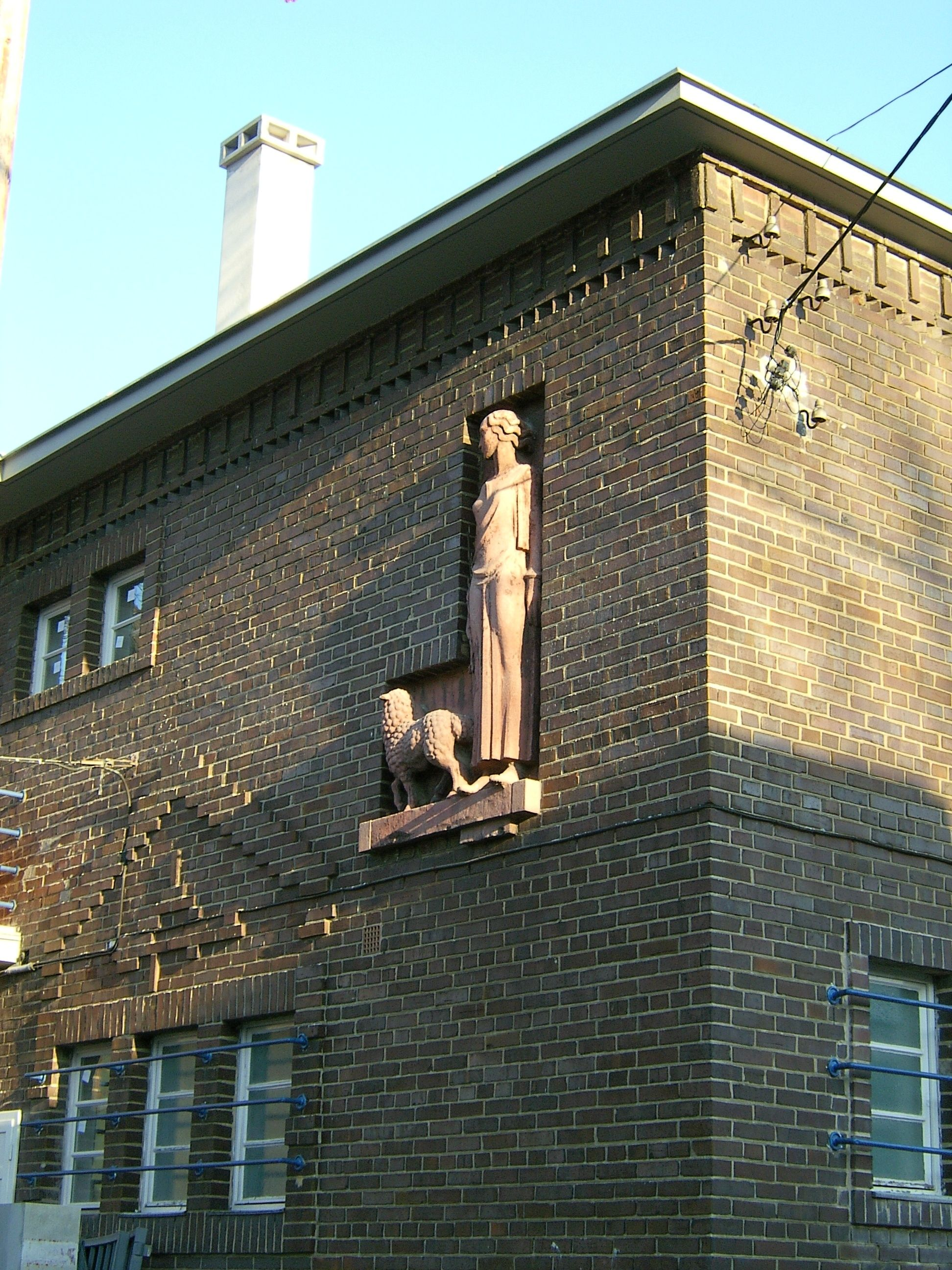 Napraforgó utcai villa domborművel (Pasarét, Budapest II.)